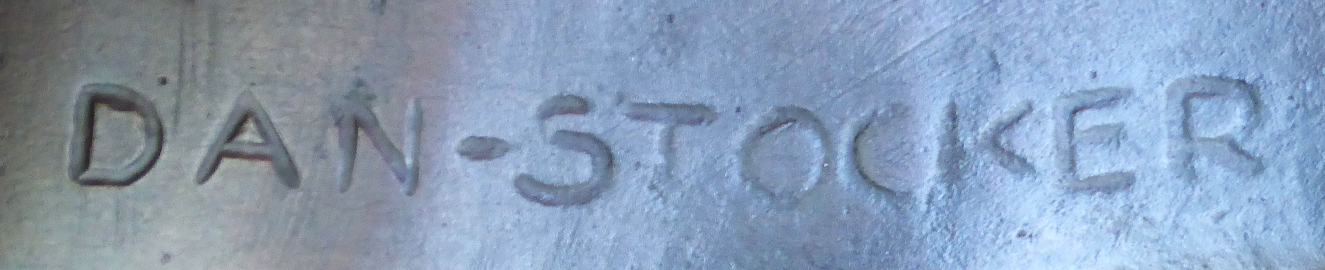 Signatur von Daniel Stocker (Bronzebüste Friedrich List, 1905). Ausgestellt im Deutschen Technikmuseum in Berlin. Wikipedianische KulTour am 10. Oktober 2015 in der Ausstellung des Museums.